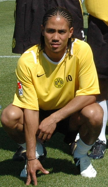 Steven Pienaar beim ersten Training von Borussia Dortmund